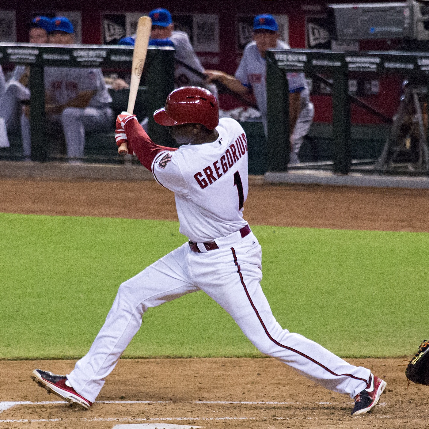 Didi Gregorius